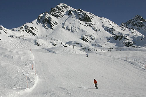 Skipiste ob La Chaux (mit dem Mont-Gelé)